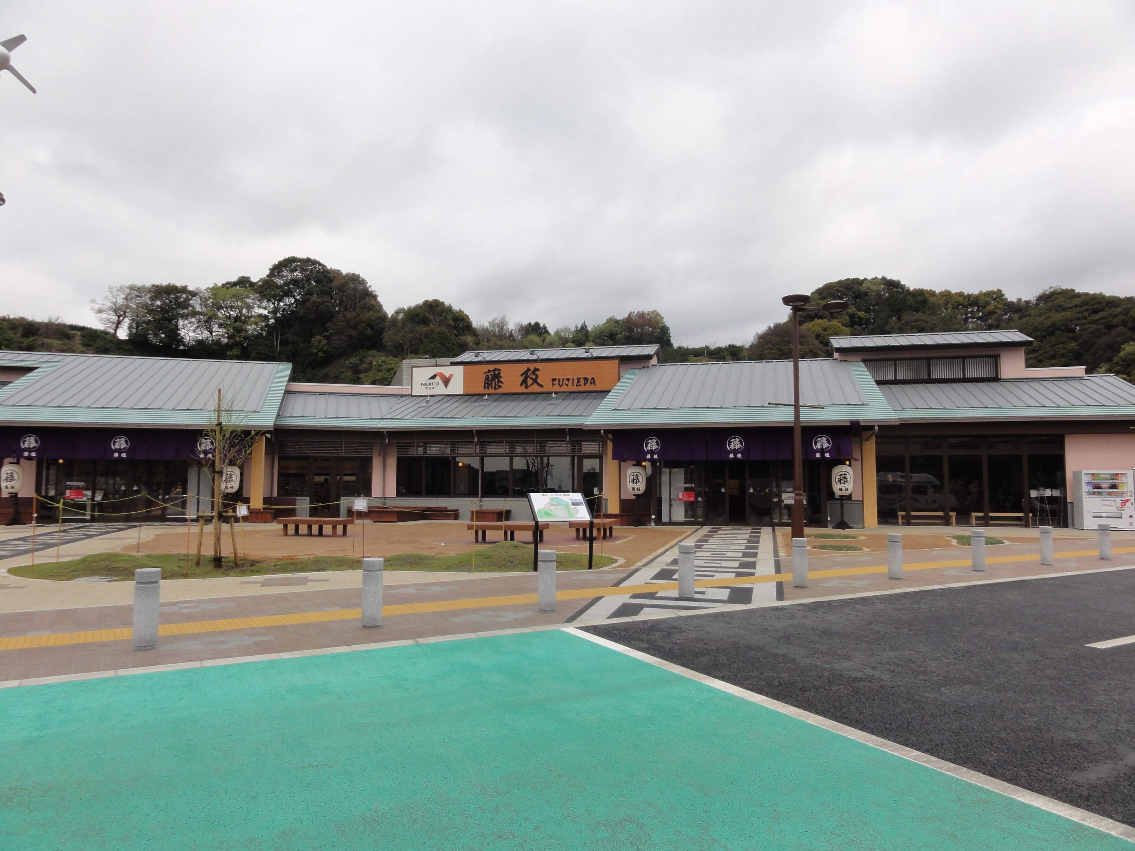 新東名高速道路 藤枝PA 上り施設